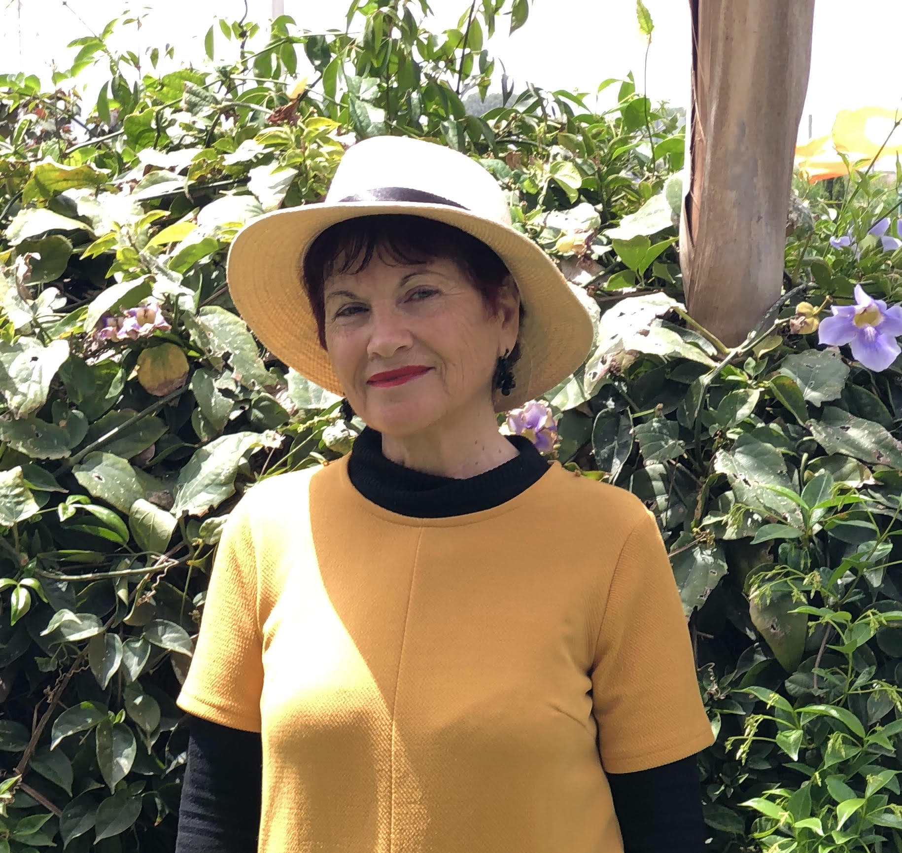 הסופרת והמשוררת חנה טואג